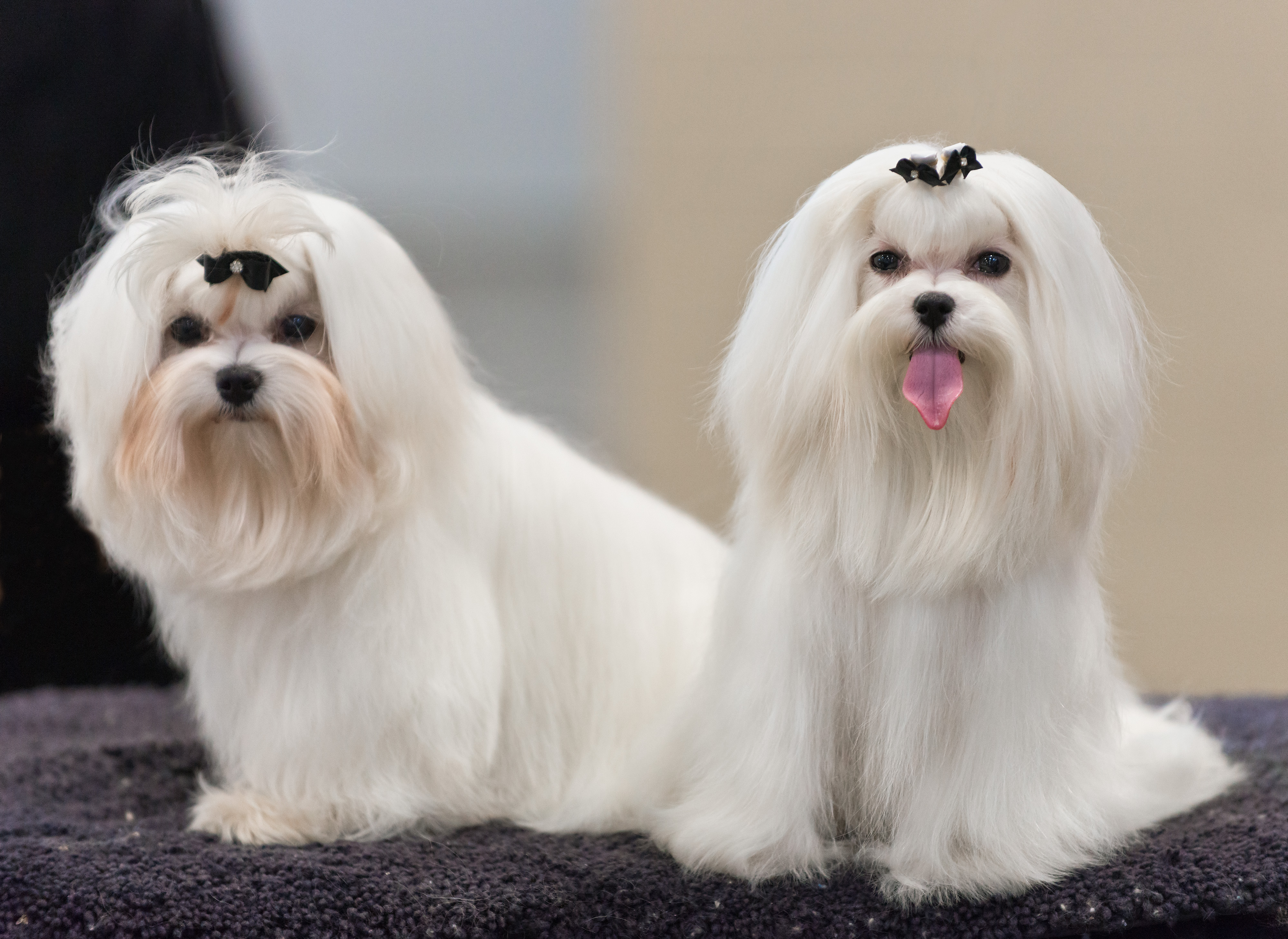 Maltese